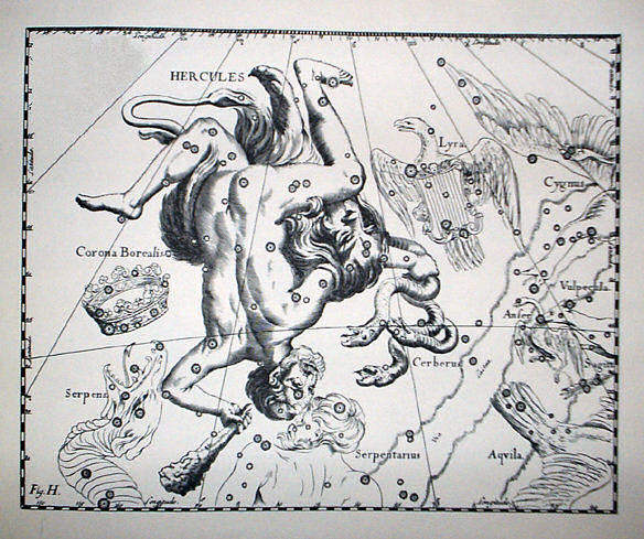 Tavola rappresentante la costellazione di Ercole nel Firmamentum Sobiescianum, sive uranographia contenuto nel Prodromus Astronomiae